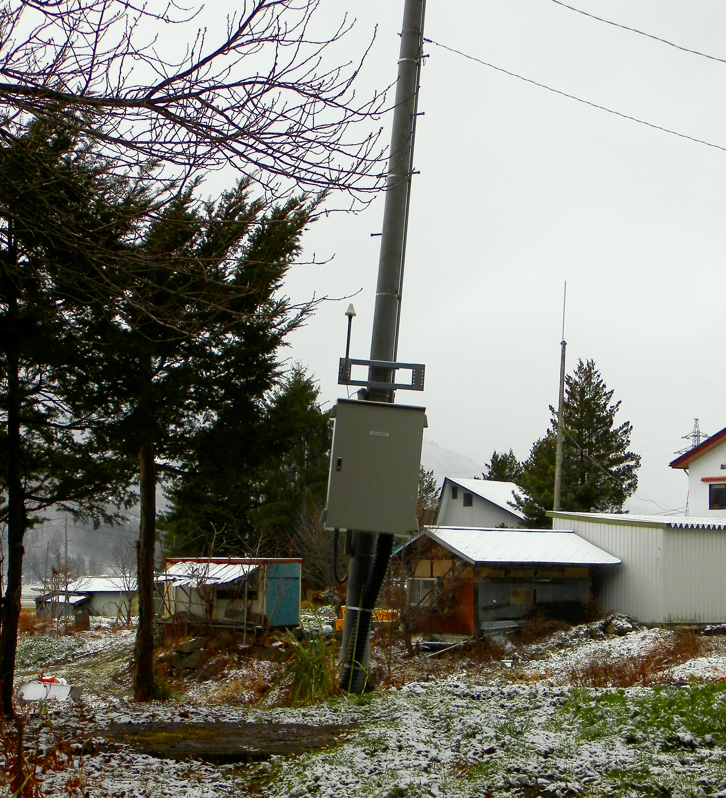 防災科学技術研究所の白馬神城高感度地震観測施設(N.HKKH)